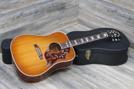 Gibson Humming bird акустичний, з жорстким кейсом,для перевезення і збереження